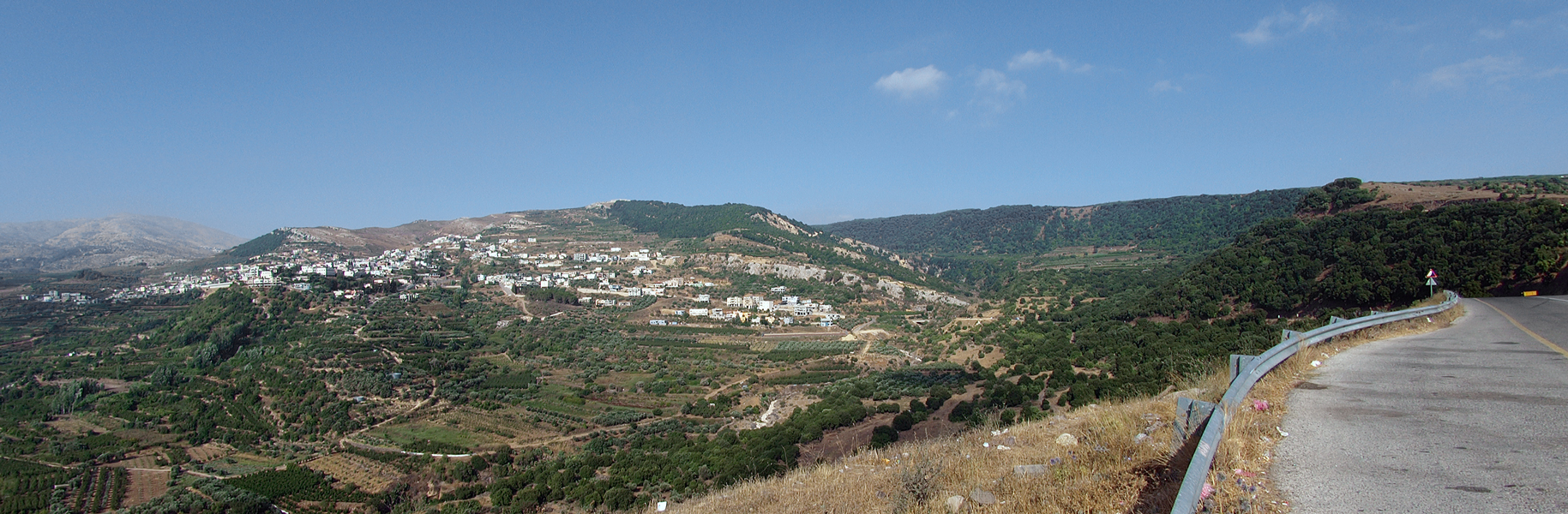 Вид на деревню Эйн-Киния